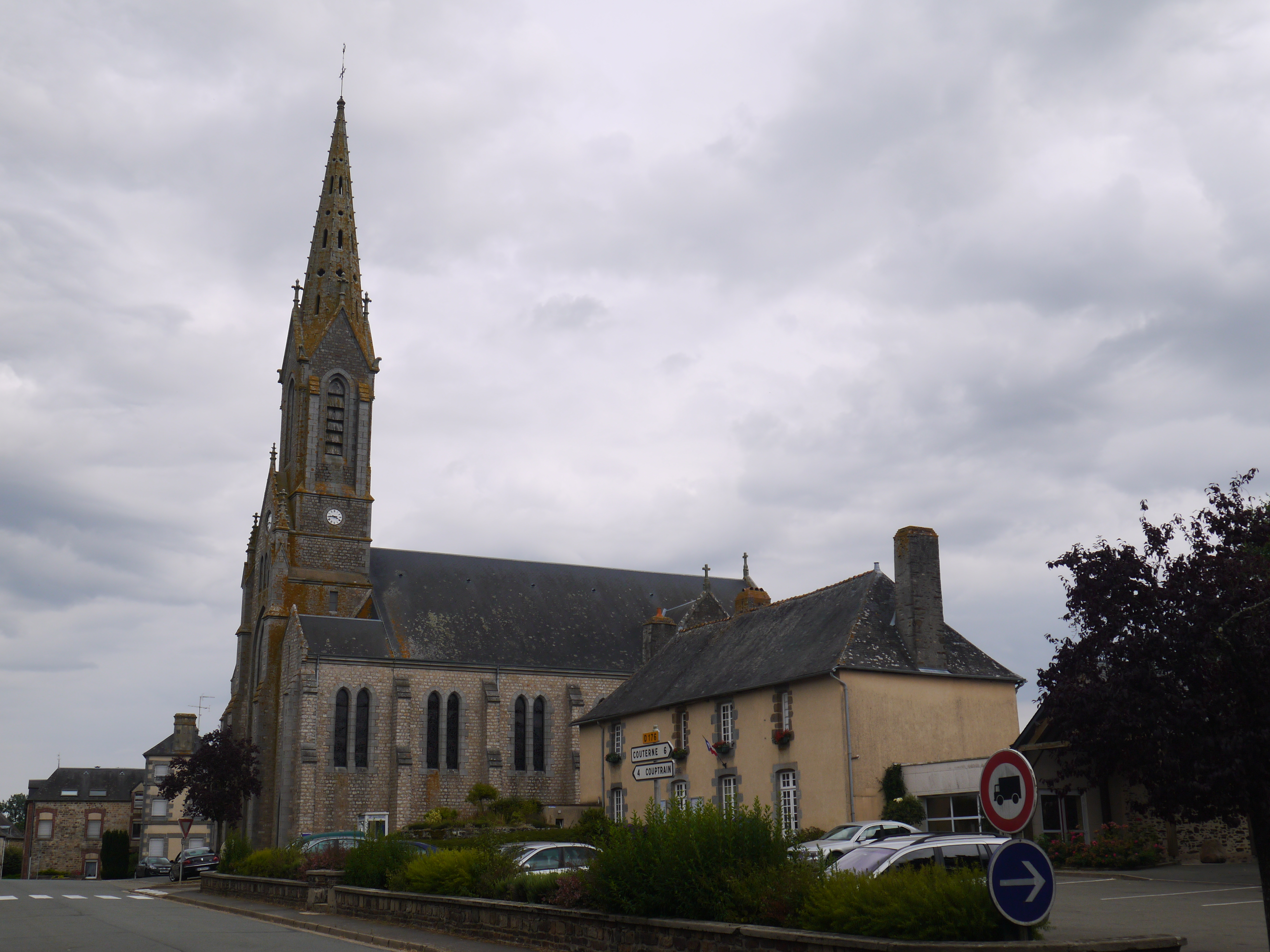 L'église et la mairie.